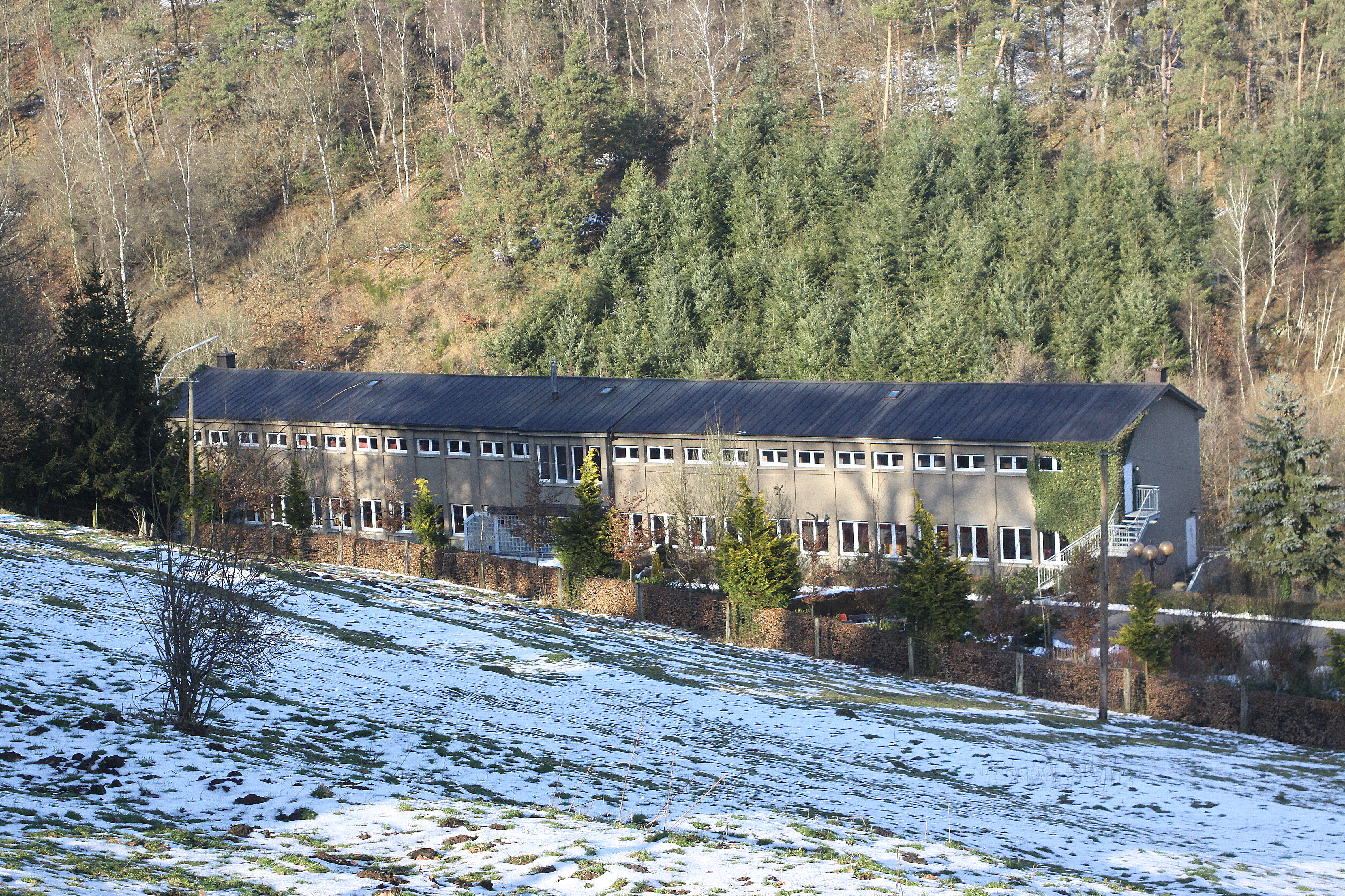 D'Dortoiren op der Pafemillen